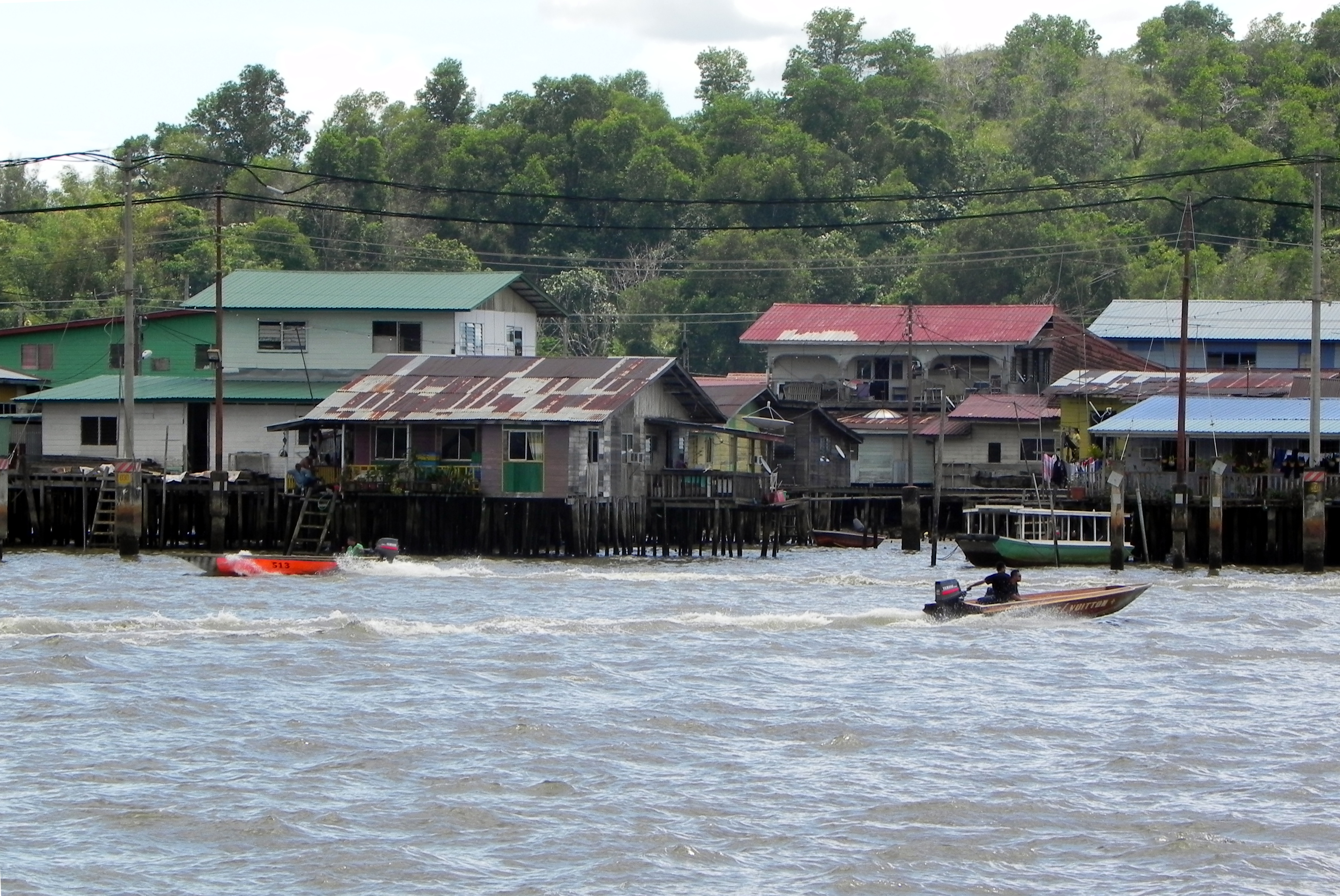 Pfahl-Häuser des Wasserdorfes Kampong Ayer am Brunei-Fluss